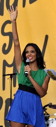 Shy'm au concert pour l'égalité de SOS-Racisme